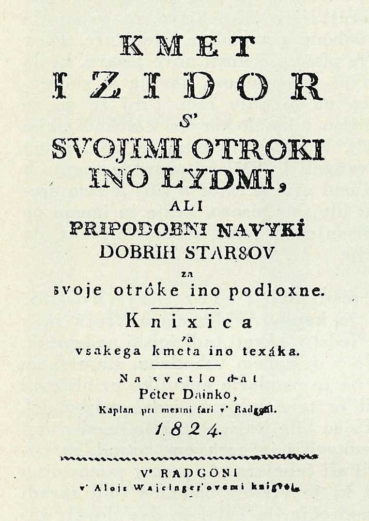 Frontpage of "Kmet Izidor", dajnčica